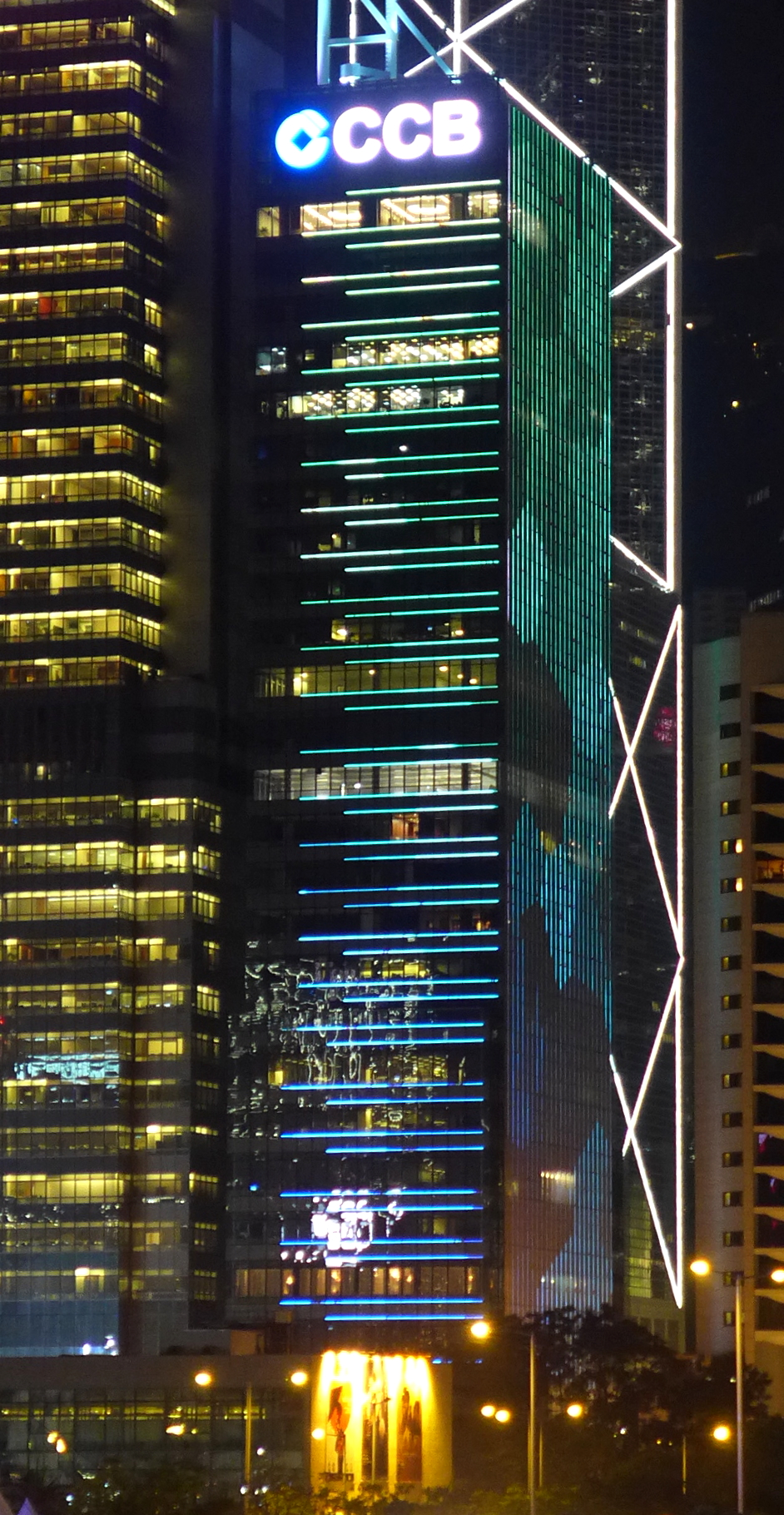 CCB Tower night view